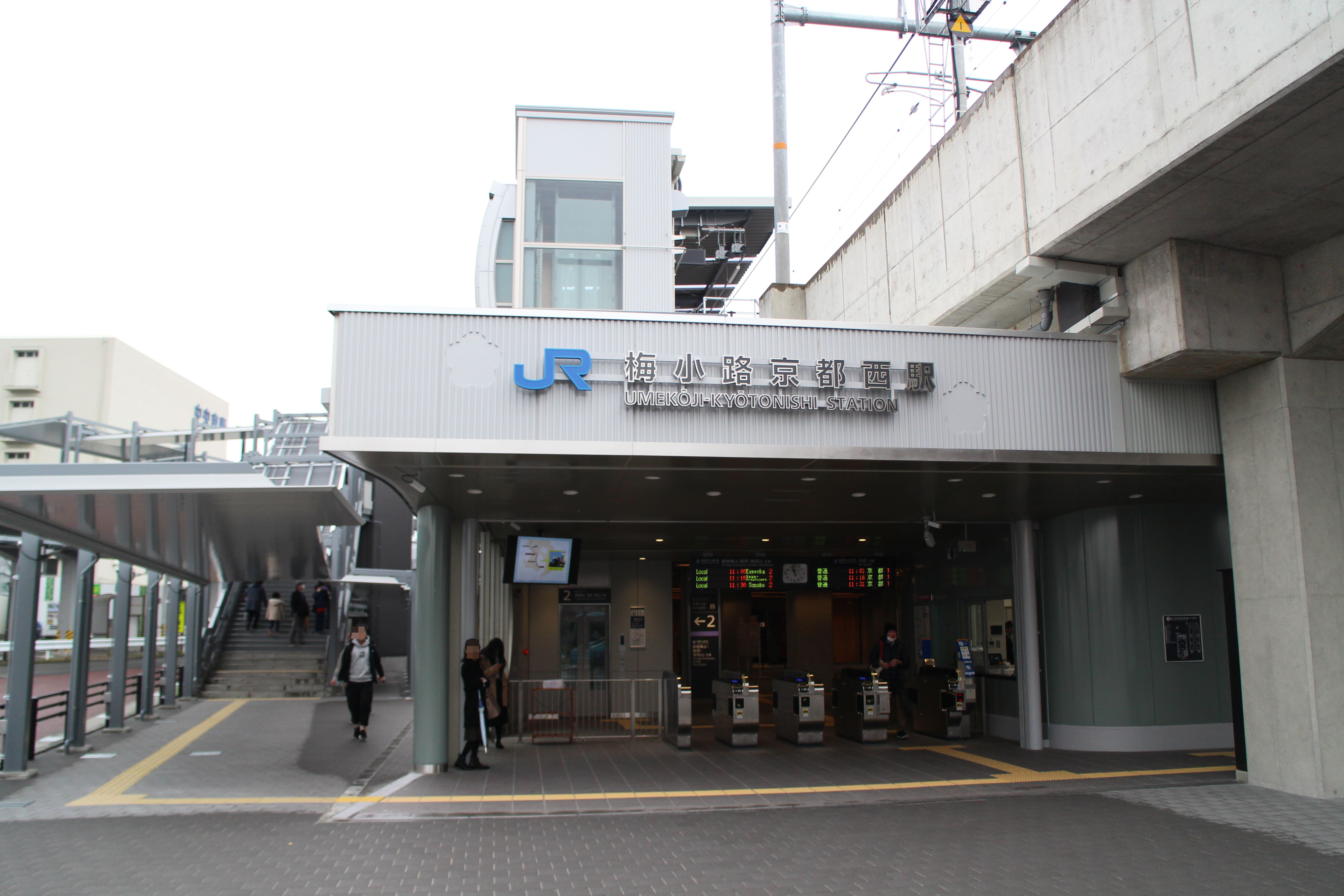 梅小路京都西駅エントランス